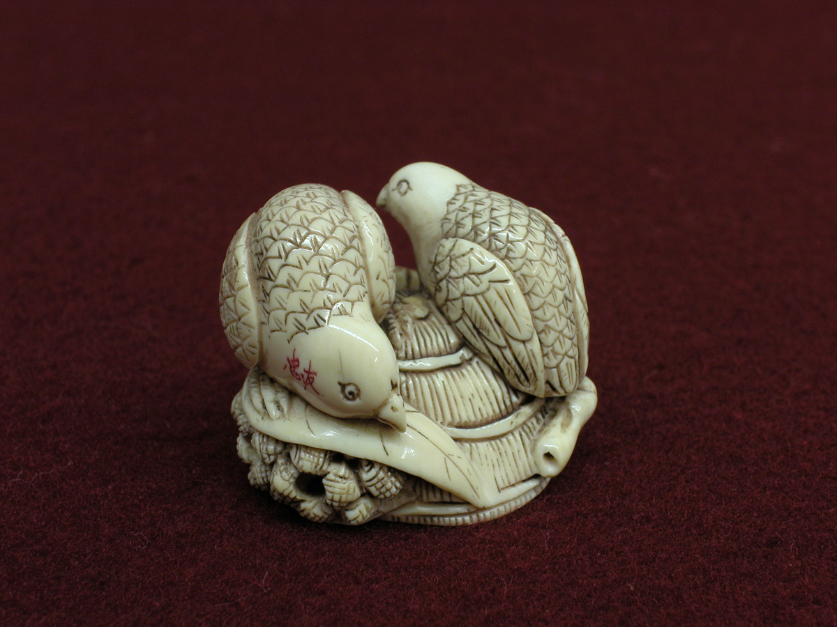 Нецке. Японія